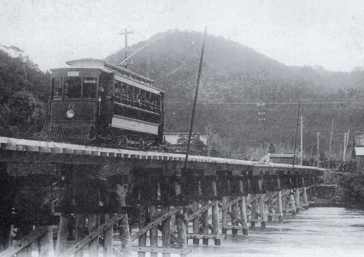 美濃電気軌道津保川橋梁を渡る12号。方向幕には「上有知行」とあり、開業間もない頃であることが窺える